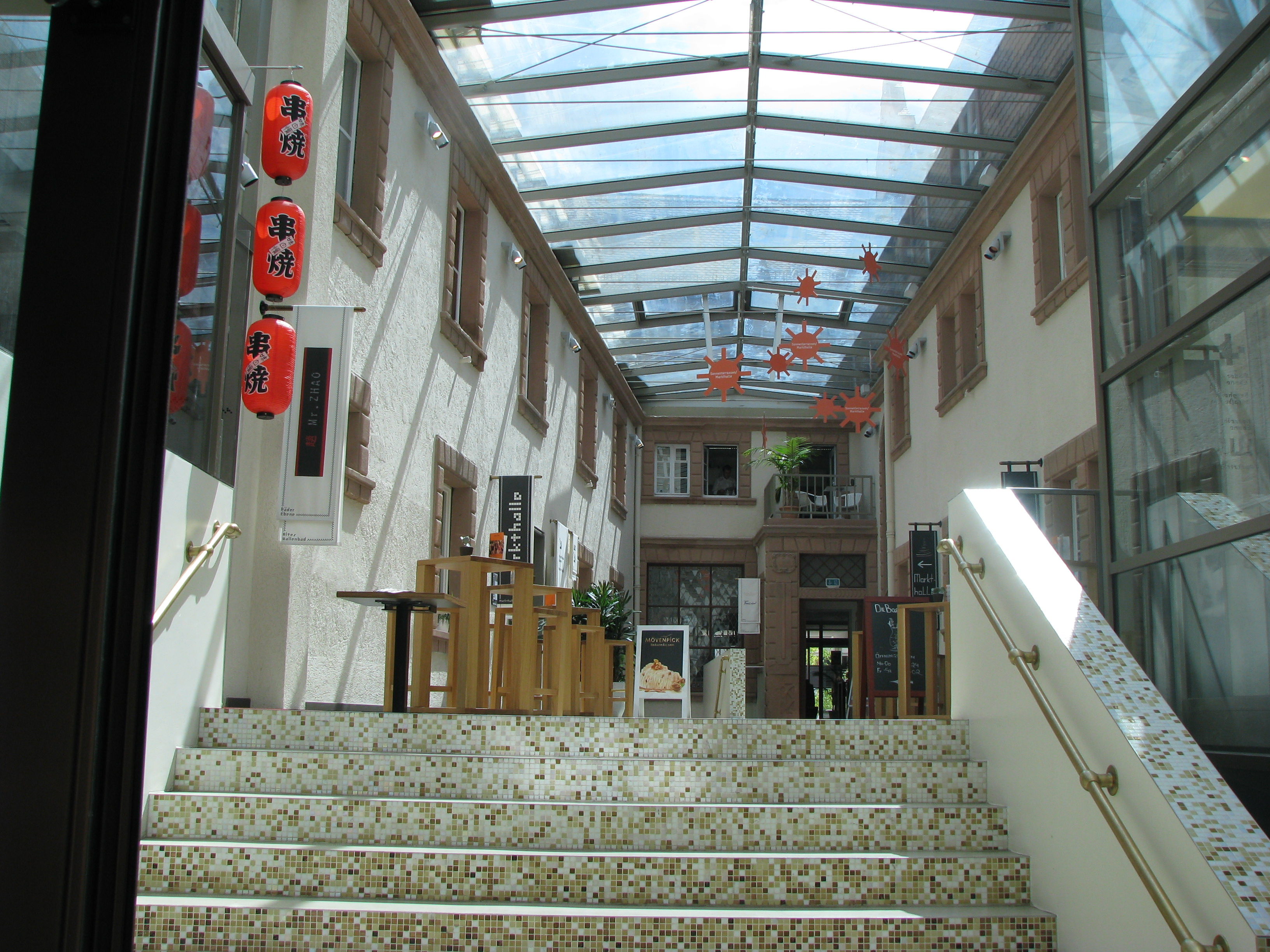 Das Alte Hallenbad in Heidelberg-Bergheim: Innenhof